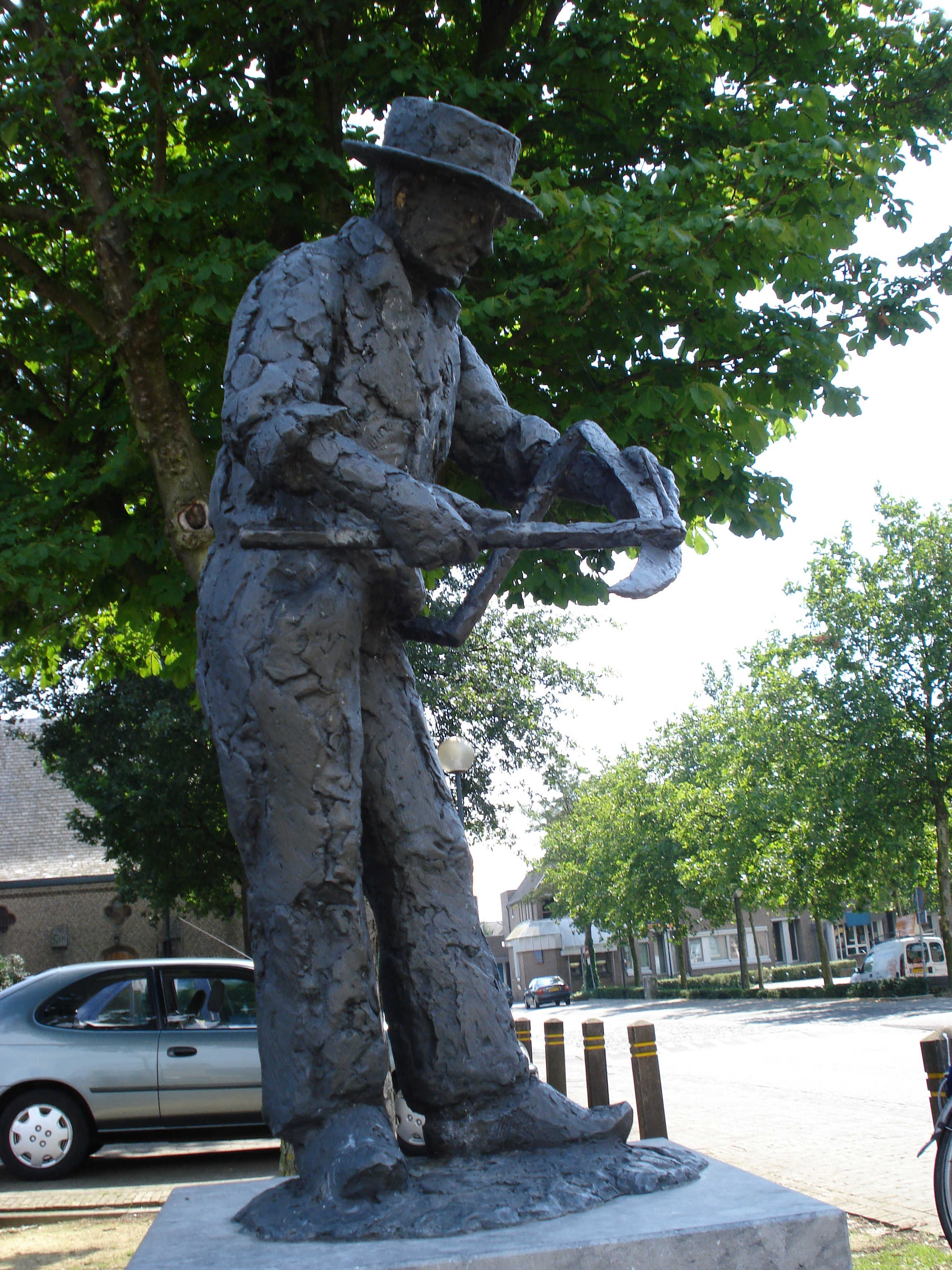 Mill, North Brabant, statue le faucheur